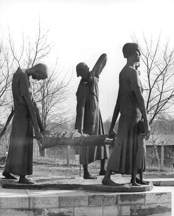 Mahn- und Gedenkstätte Ravensbrück, Plastik Zentralbild Junge 15.4.65 DDR: Zum 20. Jahrestag der Befreiung des Konzentrationslagers Ravensbrück. An der Nationalen Mahn- und Gedenkstätte Ravensbrück gedenken die Bürger der DDR und viele ausländische Gäste am 30. April dieses Jahres der 92.000 Frauen, Mütter und Kinder, die an dieser Stätte einen qualvollen Tod fanden. Hier verneigen wir uns vor den unsterblichen Helden des antifaschistischen Kampfes aus mehr als 20 Nationen, die für eine glückliche Zukunft aller Völker ihr Leben gaben. 132.000 Frauen und Kinder verschleppten die Hitlerfaschisten nach Ravensbrück, 92.000 erlebten den Tag der Befreiung nicht mehr. UBz: "Müttergruppe Ravensbrück". Plastik von Nationalpreisträger Professor Fritz Cremer. [Mahn- und Gedenkstätte für das Konzentrationslager Ravensbrück, Skulptur "Müttergruppe Ravensbrück" von Fritz Cremer]